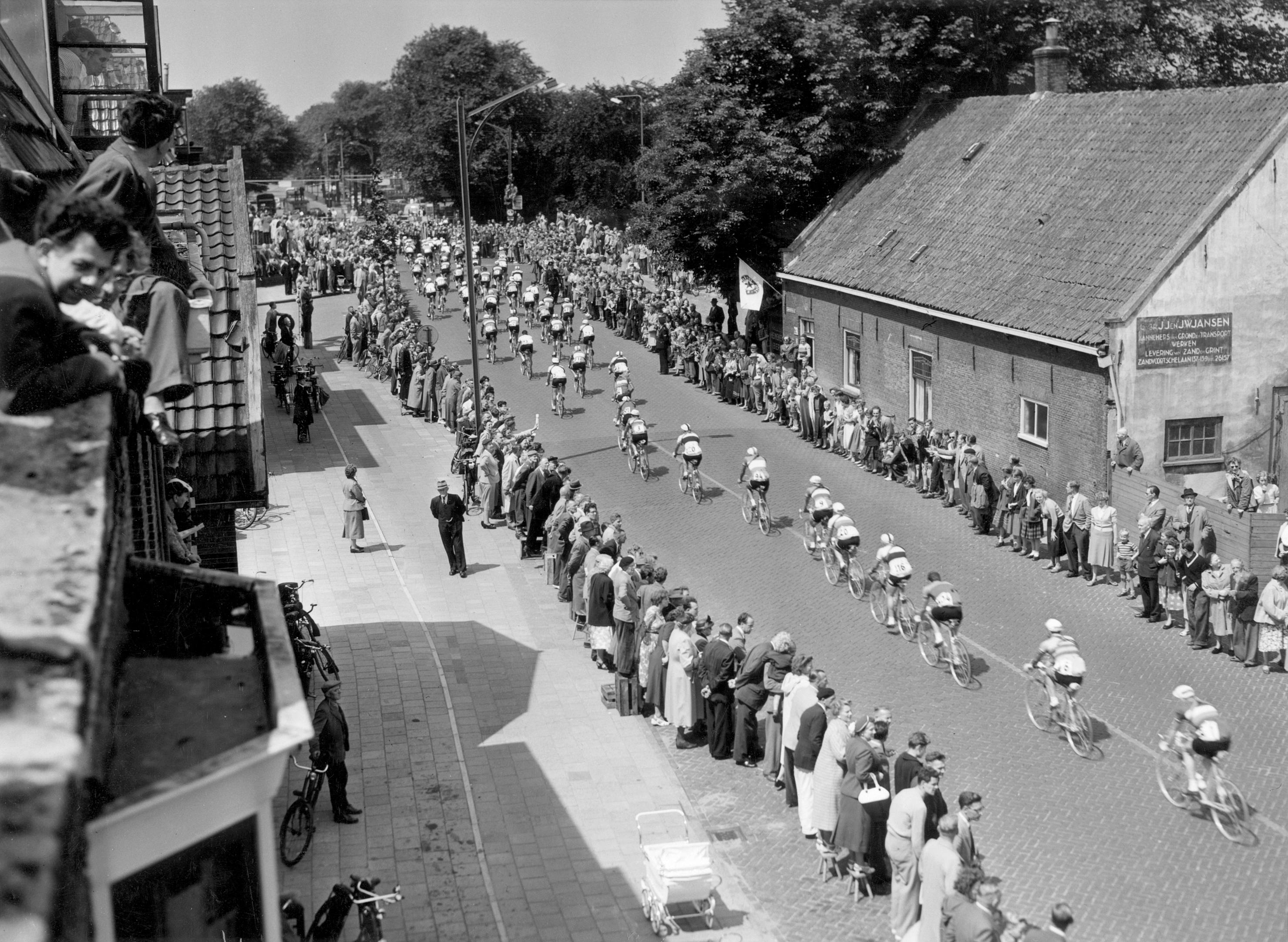 Spaarnestad Photo, SFA001014019 Tour de France in Nederland. Eerste etappe (Amsterdam-Brasschaat-Antwerpen). Het peloton op de Zandvoortselaan tussen Zandvoort en Heemstede, 8 juli 1954. Collectie SPAARNESTAD PHOTO/W.L. Stuifbergen Tour de France in the Netherlands, first stage (Amsterdam-Brasschaat-Antwerpen). Heemstede, 1954. Voor meer informatie en voor meer foto’s uit de collectie van Spaarnestad Photo, bezoek onze Beeldbank: U kunt ons helpen onze kennis van de fotocollecties te verrijken door tags en commentaren toe te voegen. Herkent u mensen of locaties of heeft u een bijzonder verhaal te vertellen bij één van de foto’s, laat dan een reactie achter (als u ingelogd bent bij Flickr) of stuur een mailtje naar: You can help us gain more knowledge on the content of our collection by simply adding a comment with information. If you do not wish to log in, you can write an e-mail to